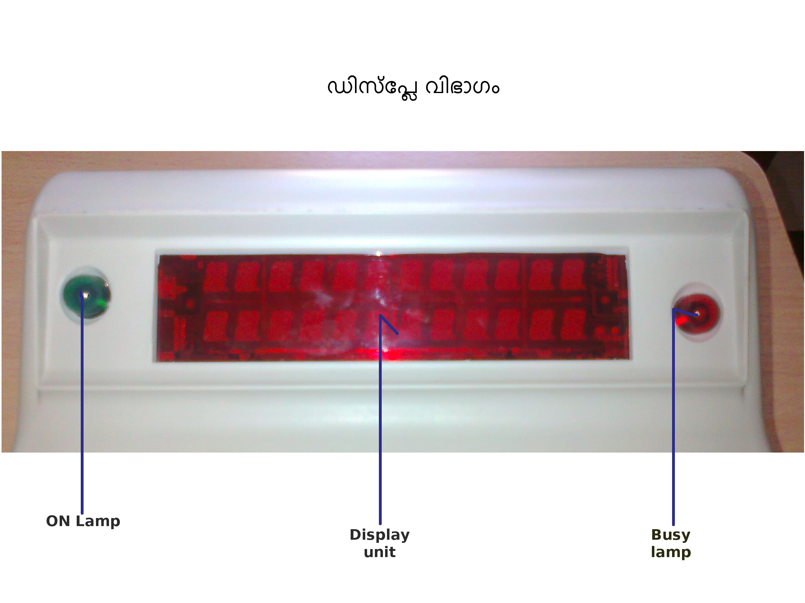 വോട്ടിംഗ് യന്ത്രത്തിന്റെ ഡിസ്പ്ലേ വിഭാഗം